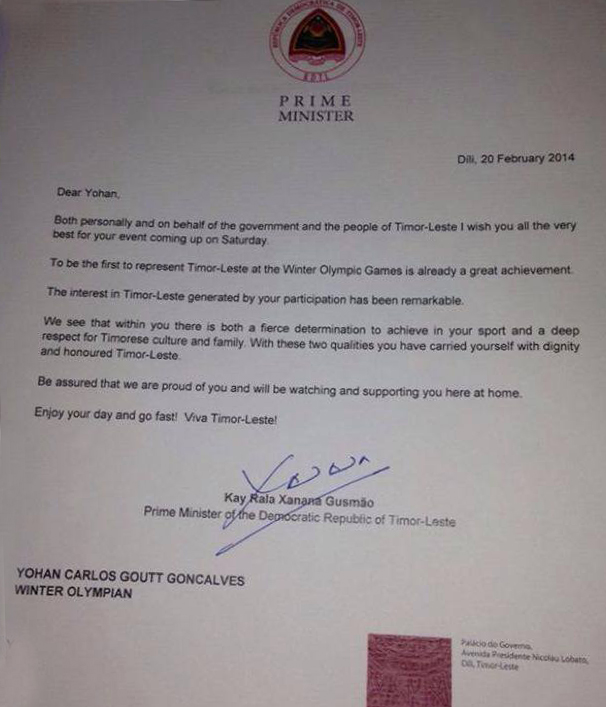 Carta do Primeiro-Ministro de Timor-Leste felicitando o esportista nacional, Yohan Carlos Goutt Goncalves.